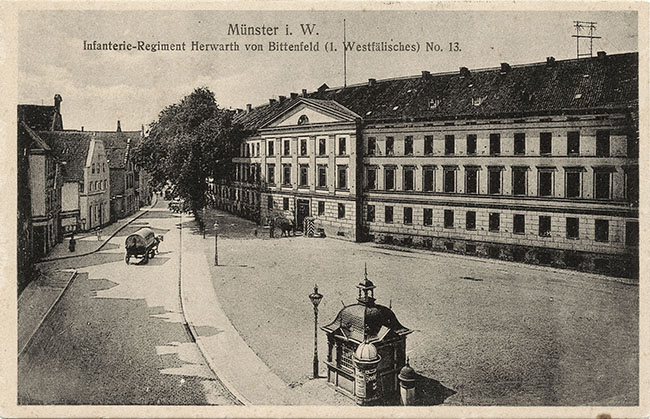 Aegidii-Kaserne des Infanterie-Regiments 13, Münster (1900)